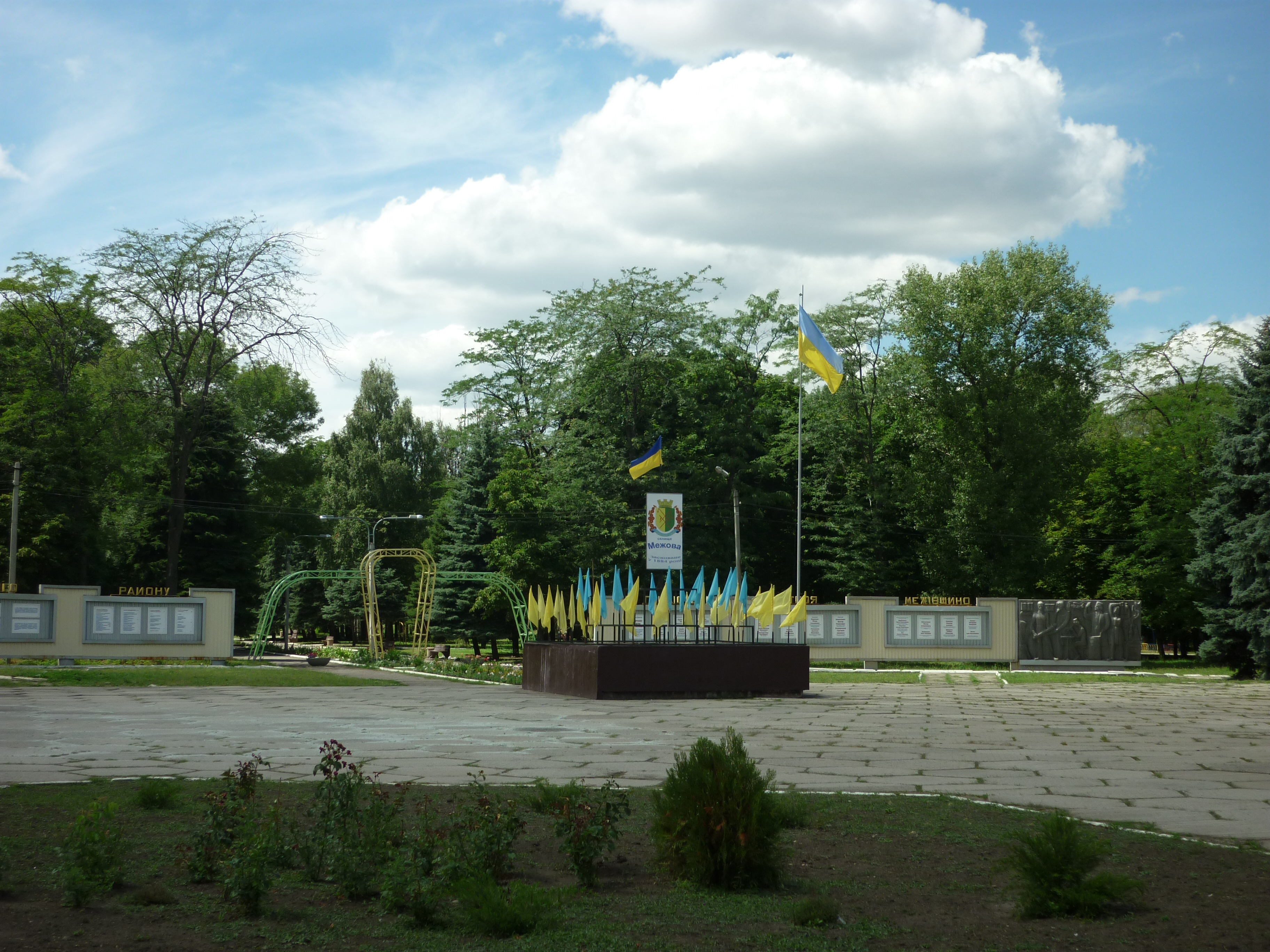 Центральна площа смт Межова